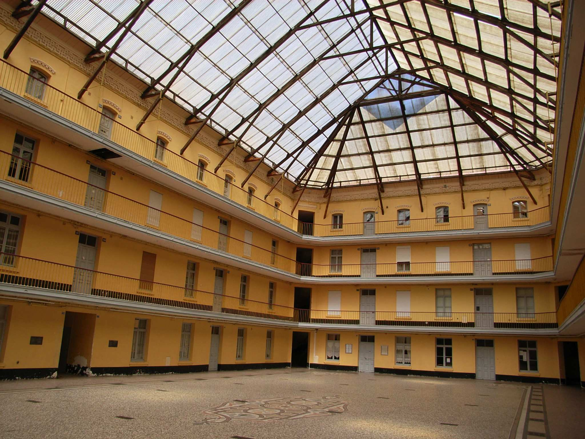 Familistère de Guise, inner court of center building